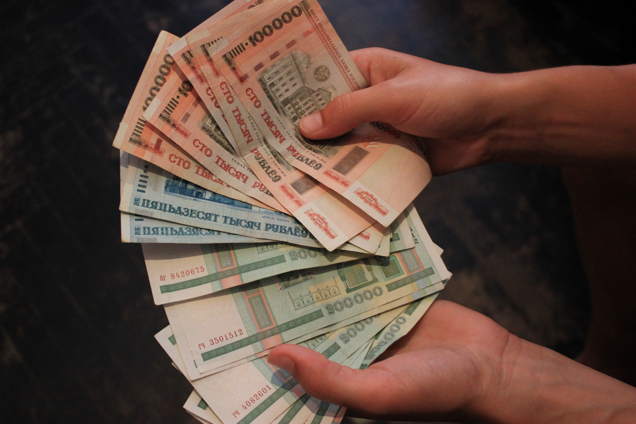 Banknoten des Weißrussischen Rubels im Gegenwert von 100 Euro.